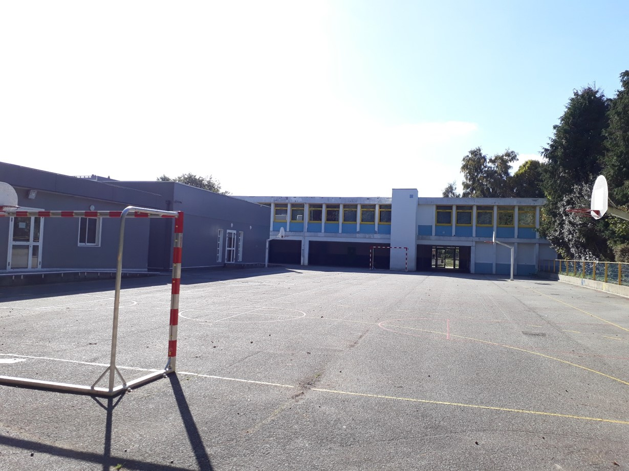 Porzh ar skolaj